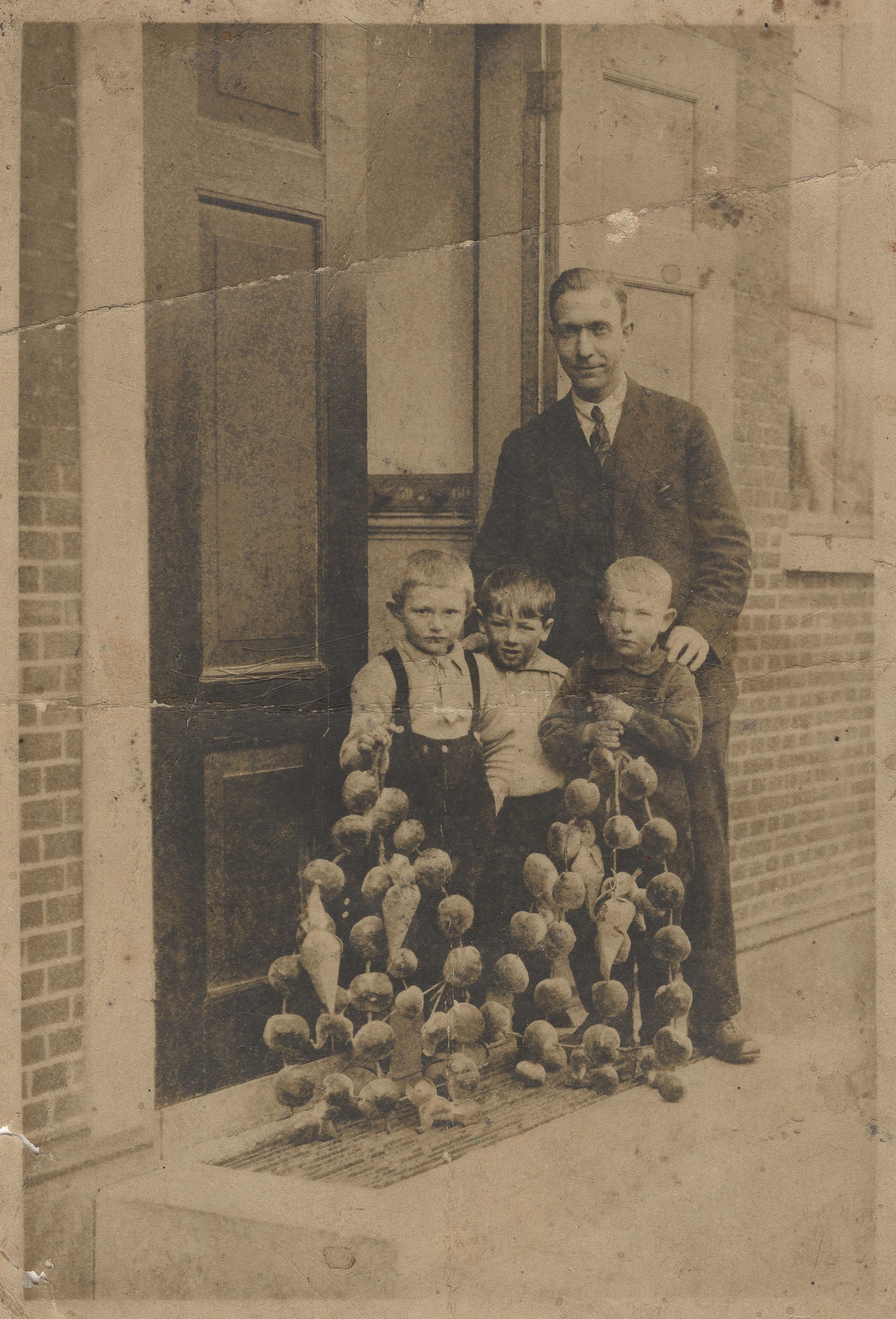 Meester met drie jongetjes met stoetbomen voor de schooldeur op hun eerste schooldag (Spijk, 1929)Foto uit de collectie van Groninger Archieven, identificatienummer NL-GnGRA_2138_7661